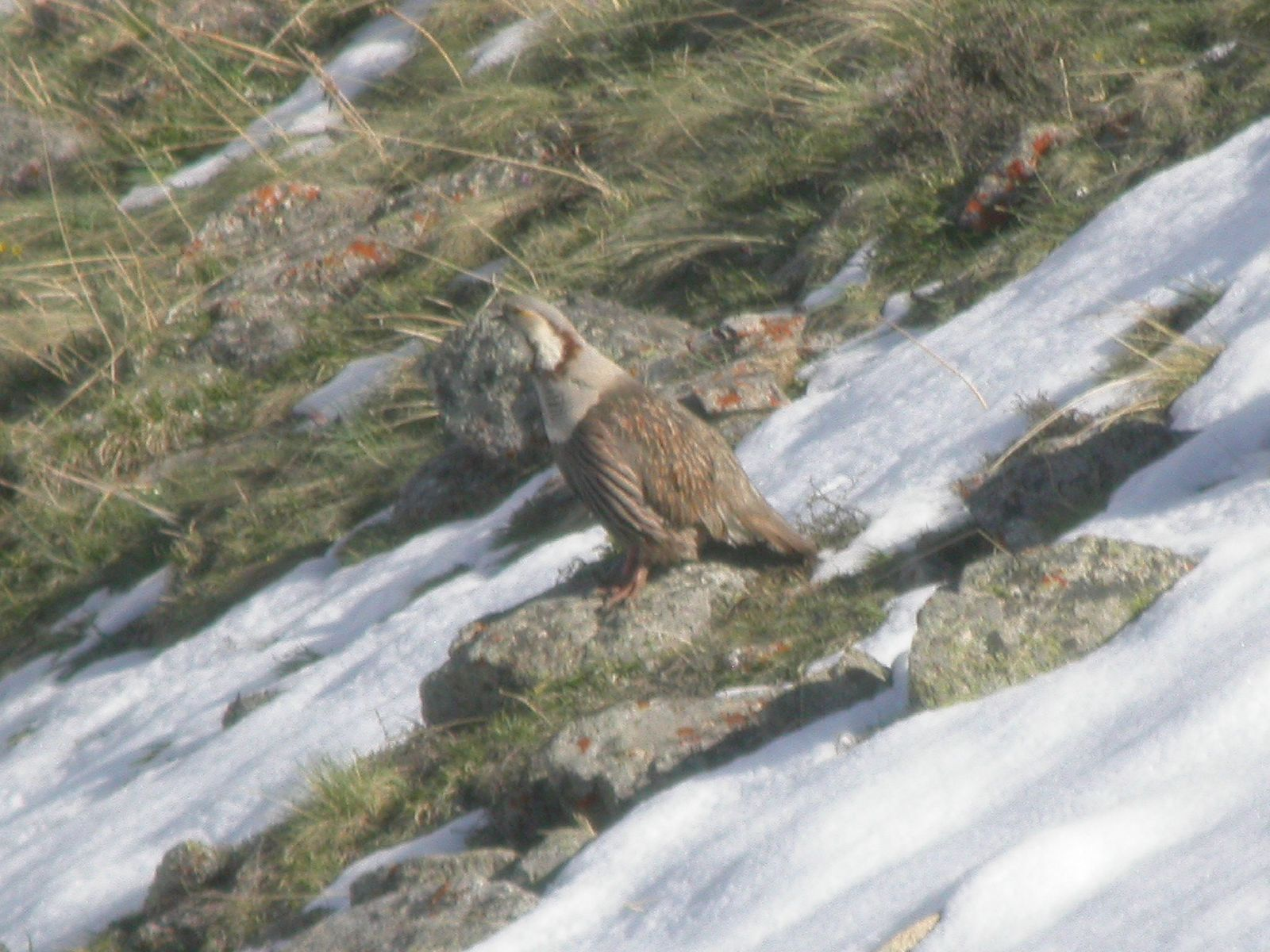 Himalayan Snowcock (Tetraogallus himalayensis)